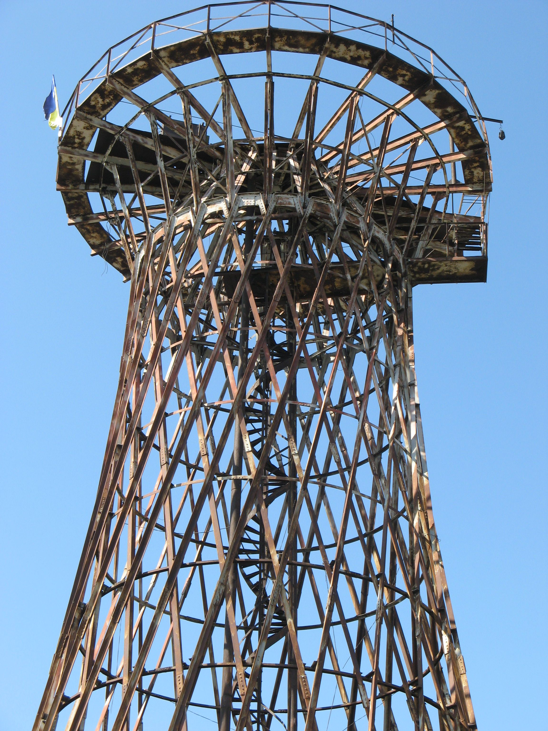 Шуховська вежа (Конотоп)